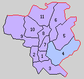 宮崎県北諸県郡の町村制時点の町村。